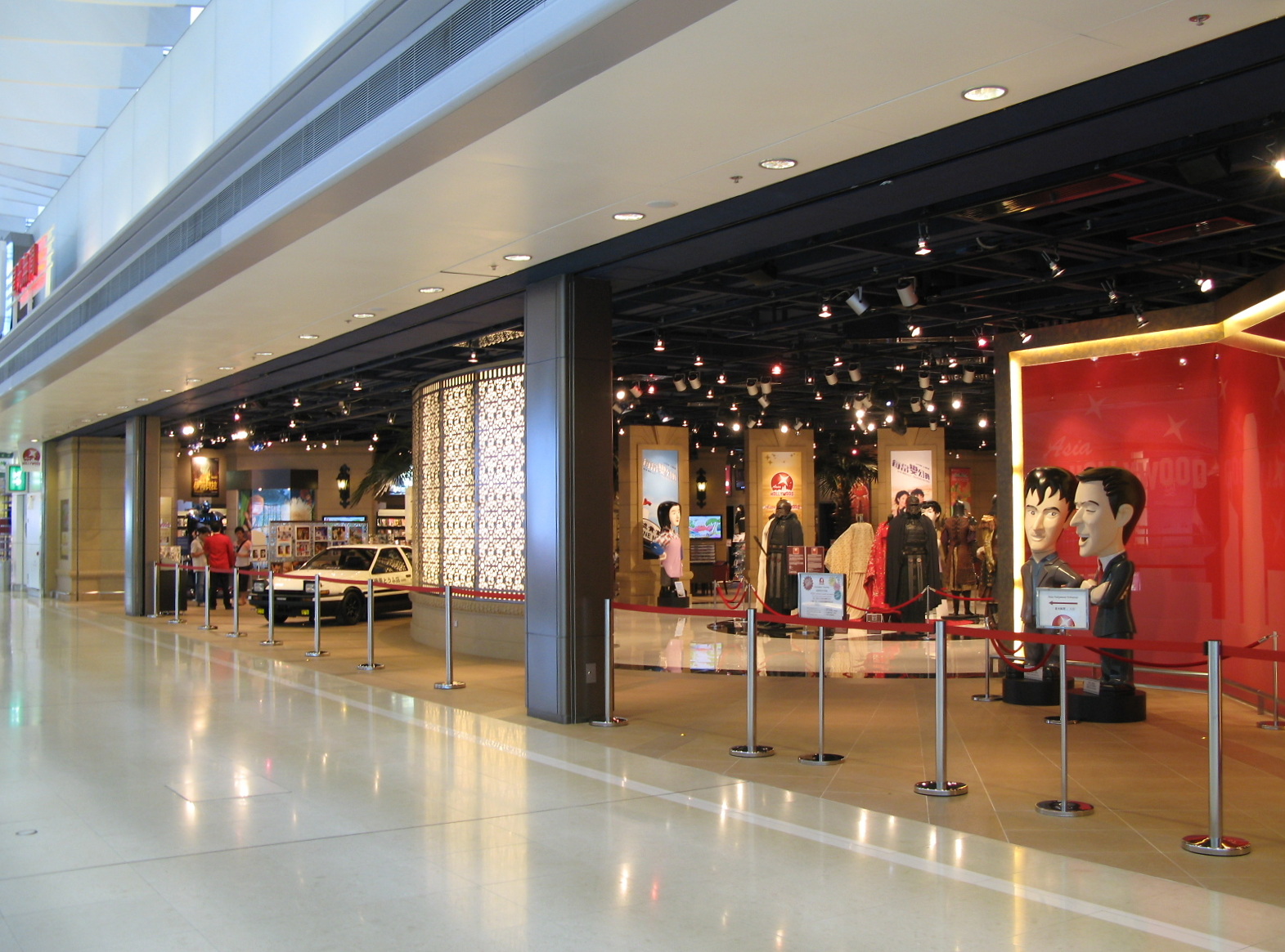 Skyplaza Asia Hollywood